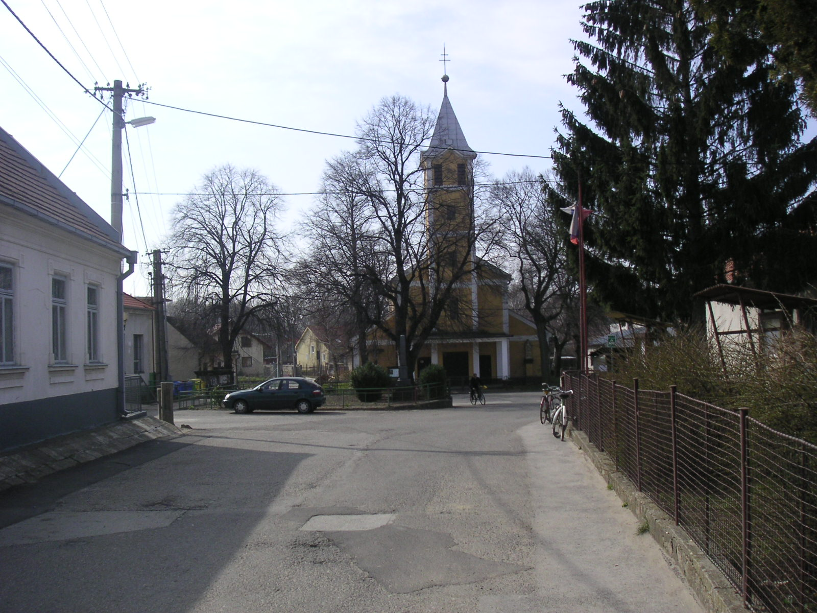 Chapel in Suchohrad, Slovakia